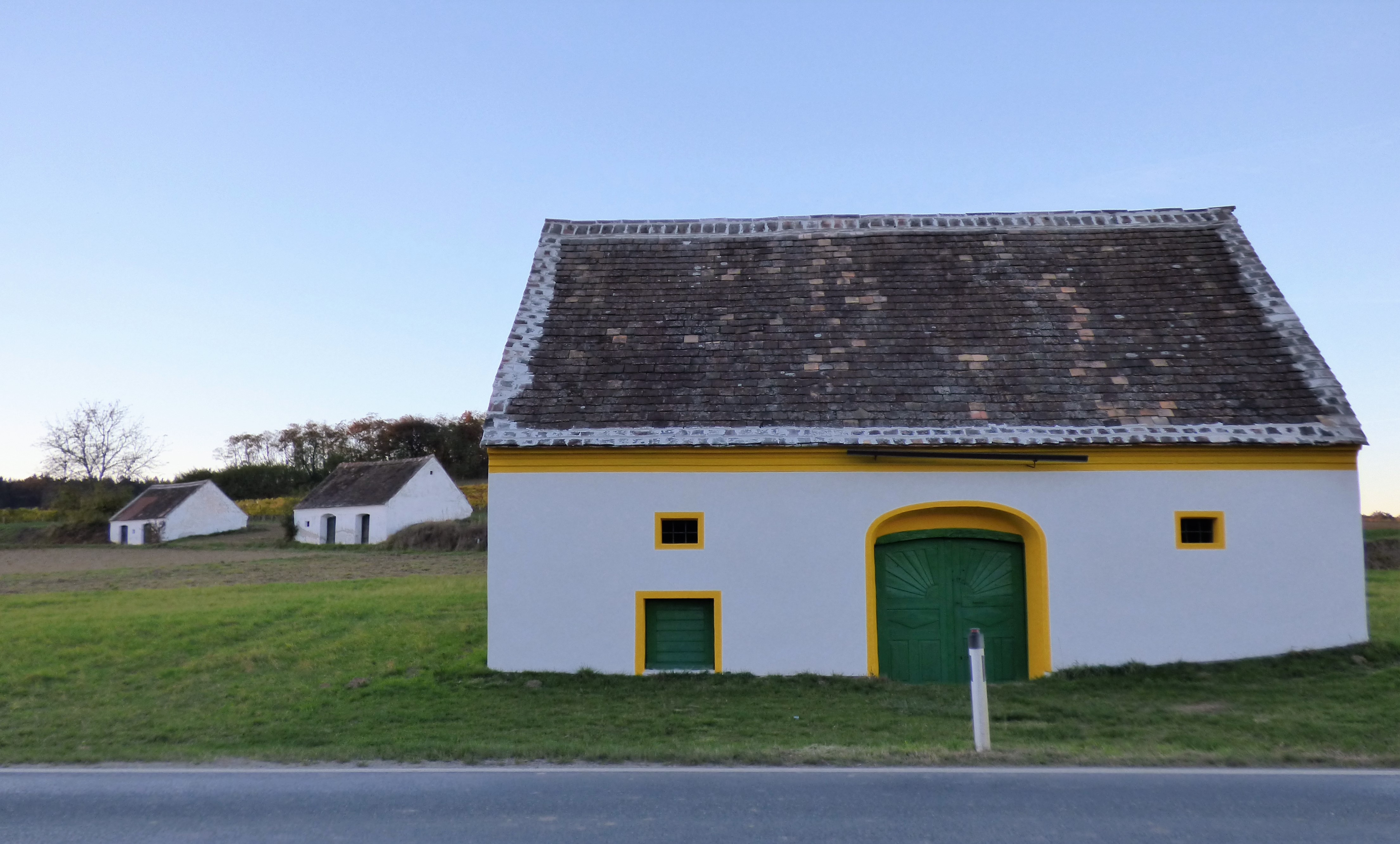 Grübern (Gemeinde Maissau, Niederösterreich): Kellergasse Kogelfeld